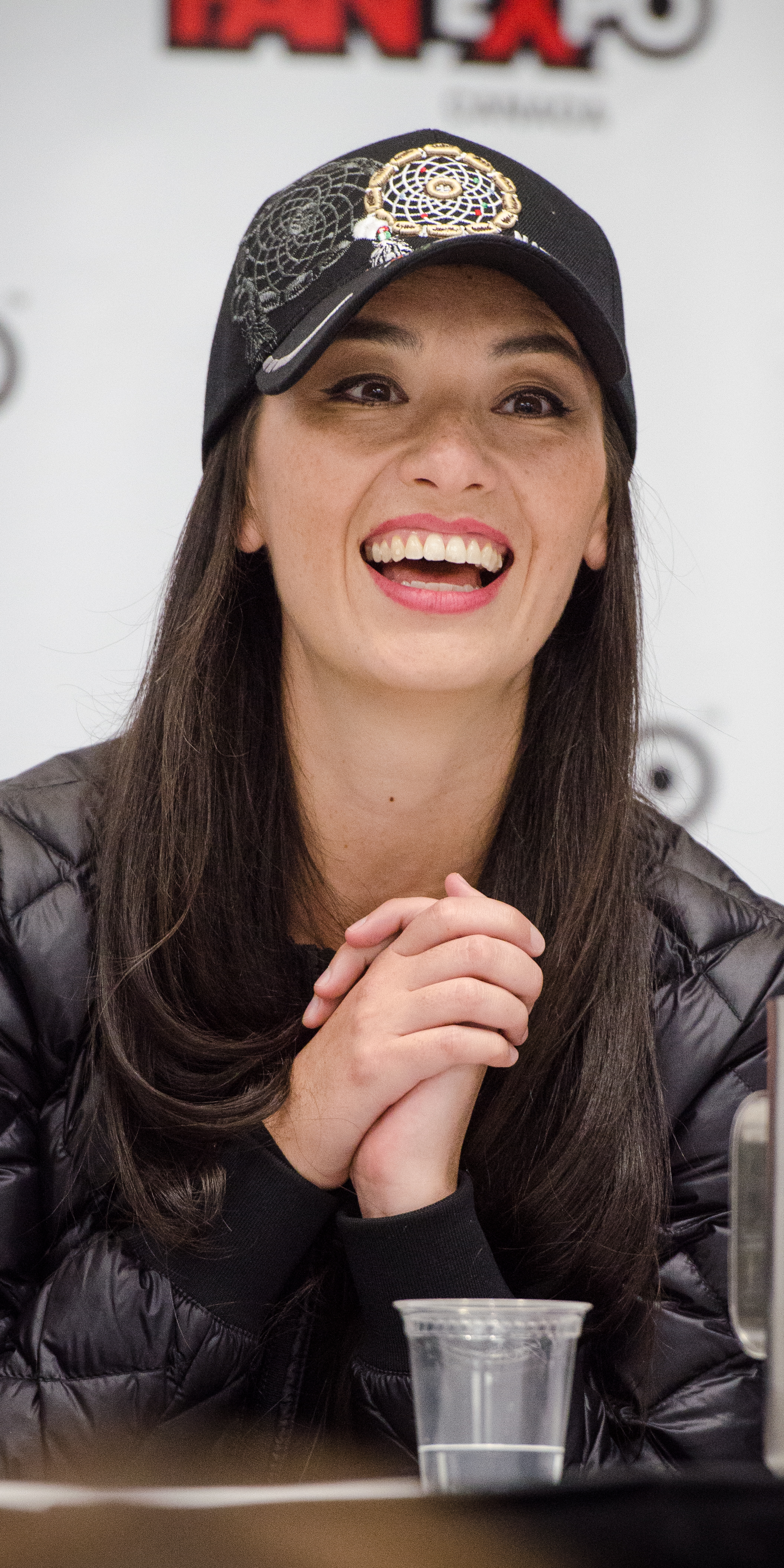 Cara Gee [6]